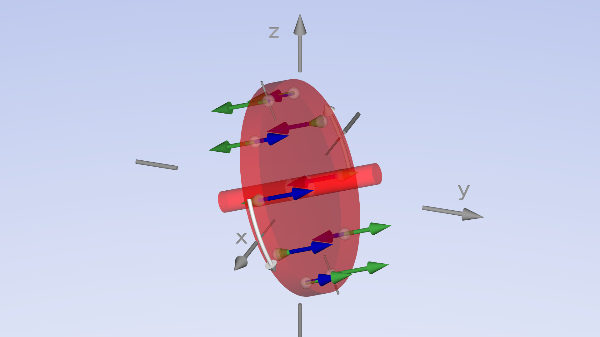 Kreiselmoment anhand eines Masseelements, das mit dem rotierenden Kreisel gekippt wird. Dabei steht der grüne Pfeil für die Geschwindigkeitskomponente v⊥ senkrecht zur Rotationsebene des Kreisels und der blaue Pfeil für die Kraft F⊥ auf das Masseelement senkrecht zur Rotationsebene.